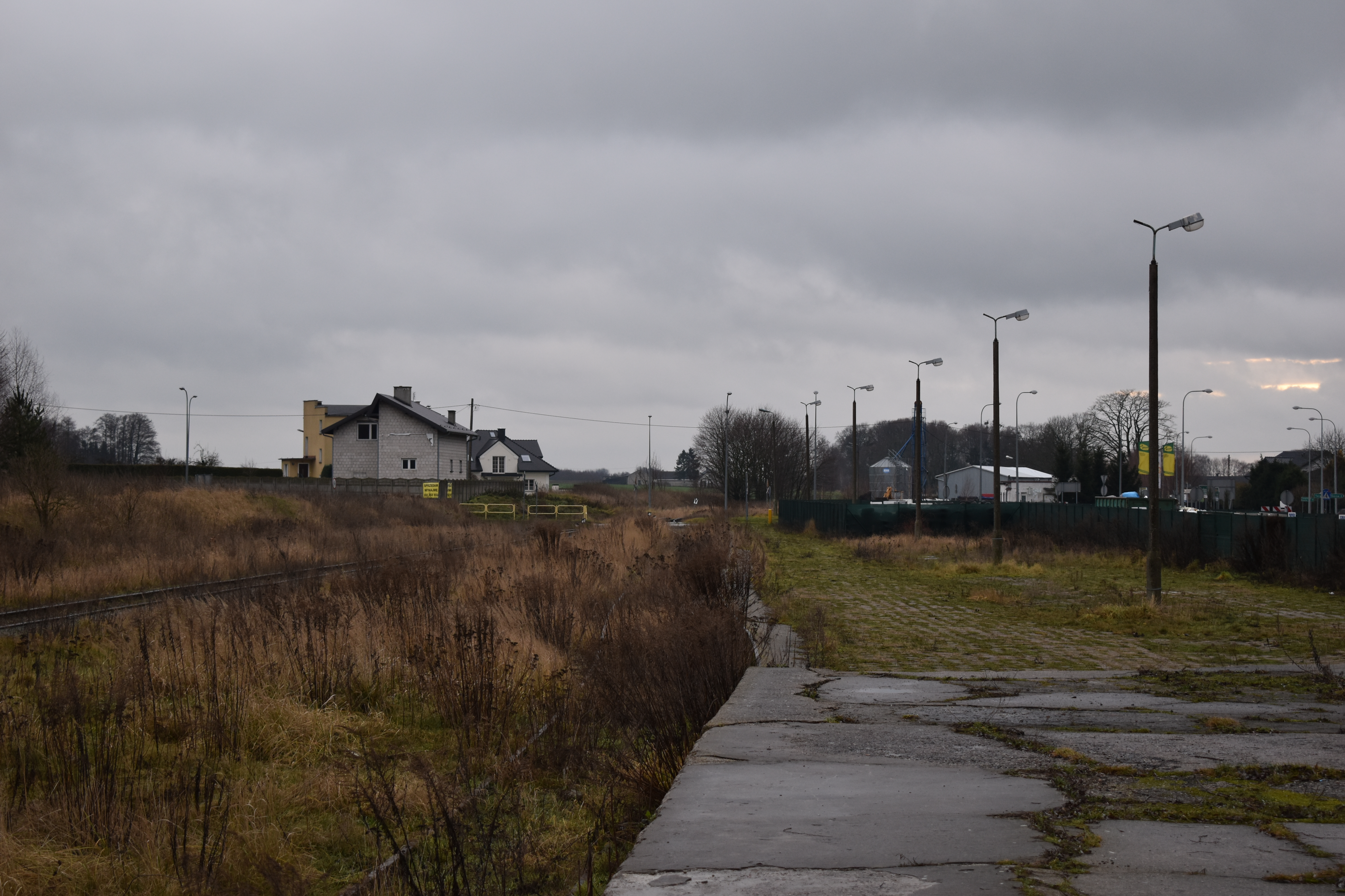 Peron w Lubawie, stan na 26.12.2019